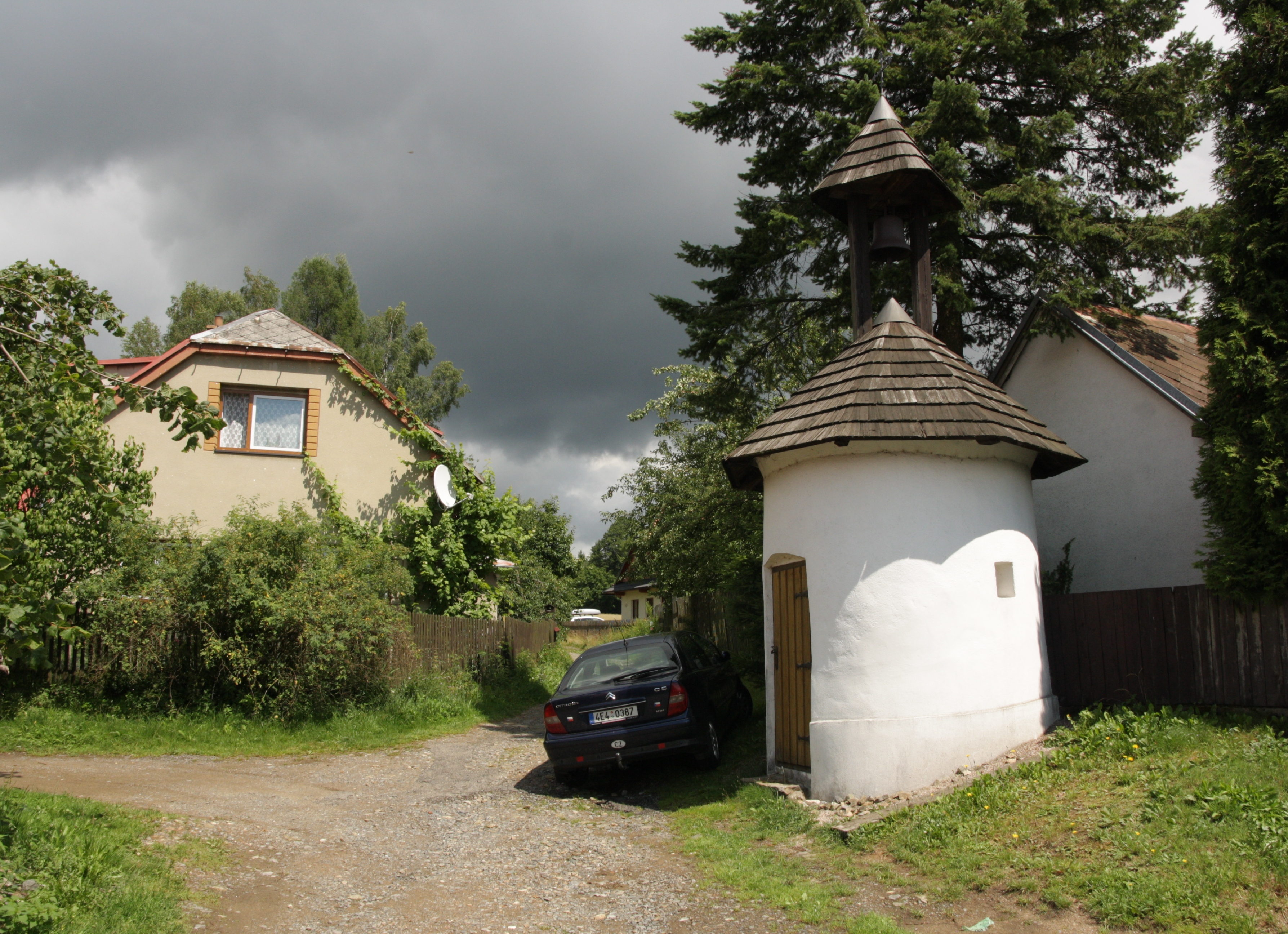 Cikháj - zvonička v centru obce.